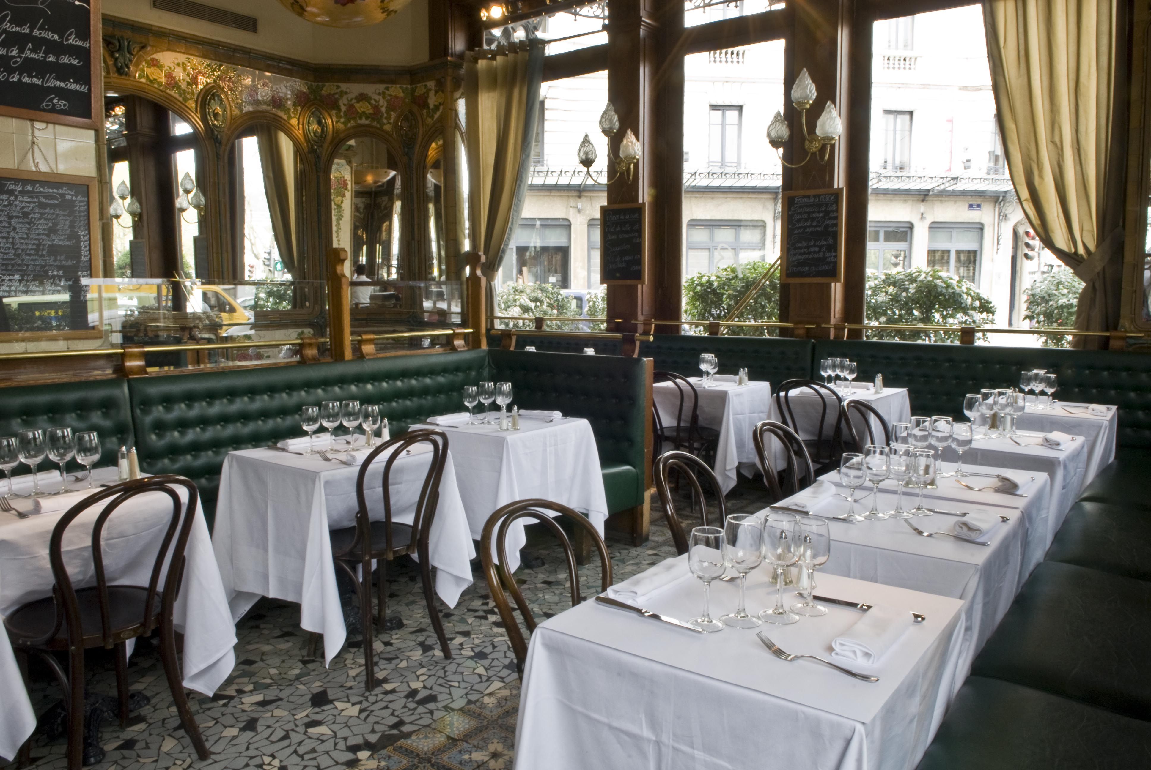 Lyon (Rhône, France) - Brasserie des Brotteaux, salle 2